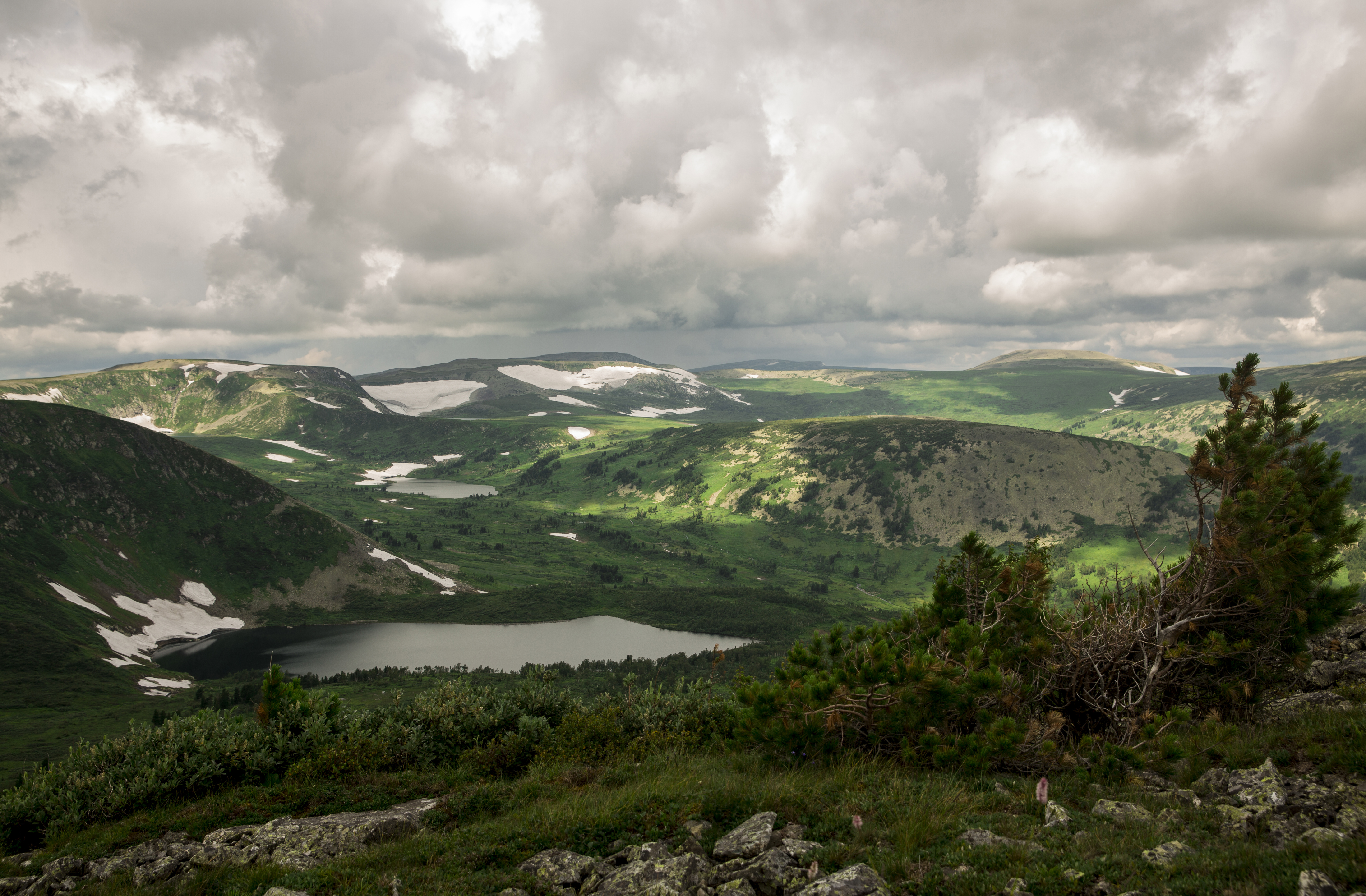 Кузнецкий Алатау: на территории Междуреченского городского округа, Новокузнецкого и Тисульского районов, Кемеровская область This image is related to the protected area of Russia number 4200012